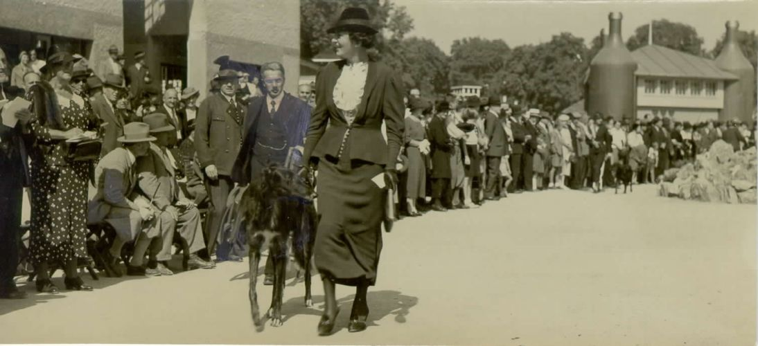 Vida Jeraj - Vovk (1875-1932), Ljubljanski velesejem - razstava psov